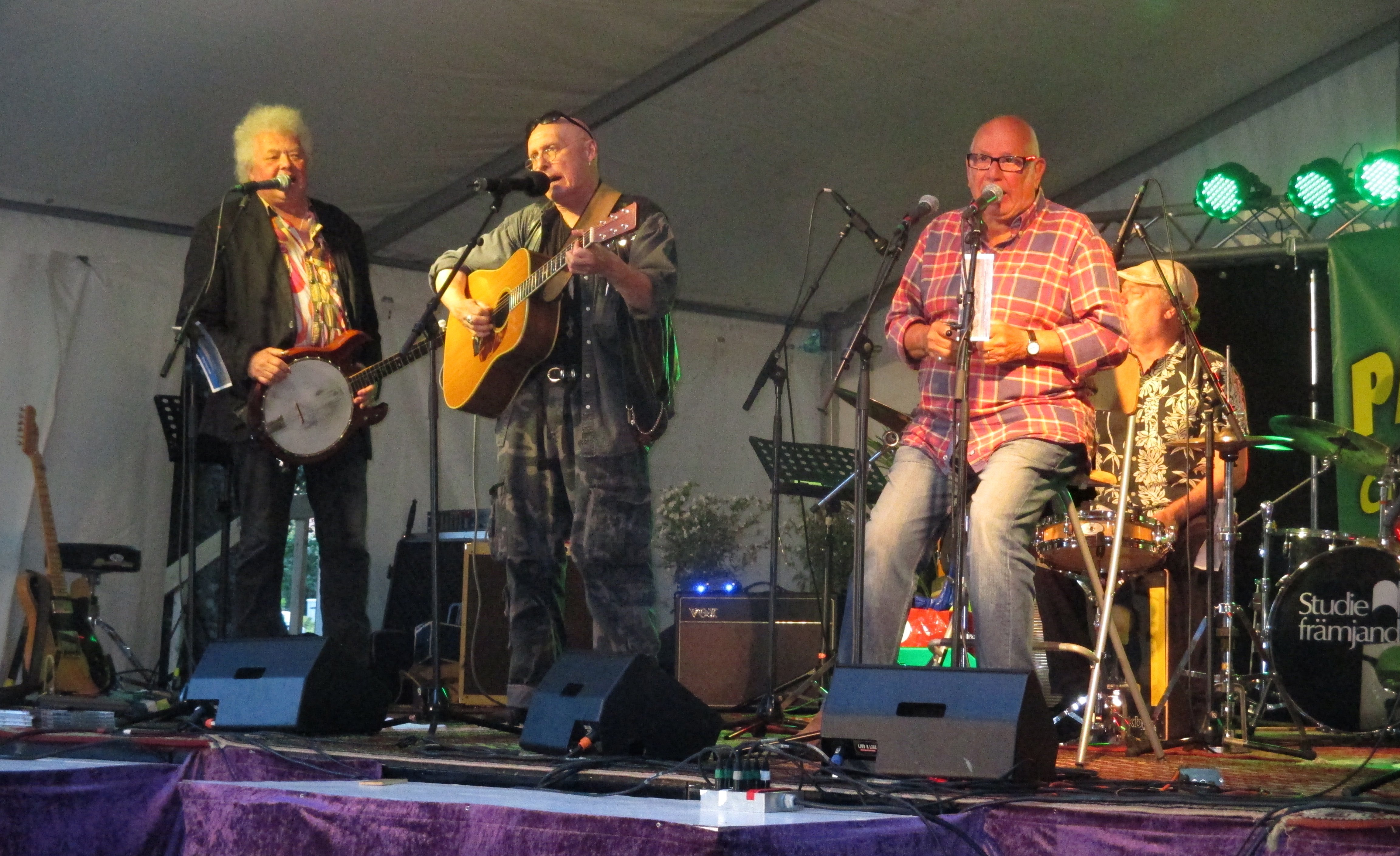 Grus i dojjan spelar på Parkfestivalen (Country och Visfestival Falköping) 8 augusti 2015 i Mössebergsparken, Falköping, Falköpings kommun, Västergötland, Västra Götalands län, Sverige. Från vänster ses Jesper Lindberg (banjo, gitarr, sång), Tore Persson (gitarr, sång), Krutte Hedberg (sång, munspel) och Tom Martinsen (slagverk).